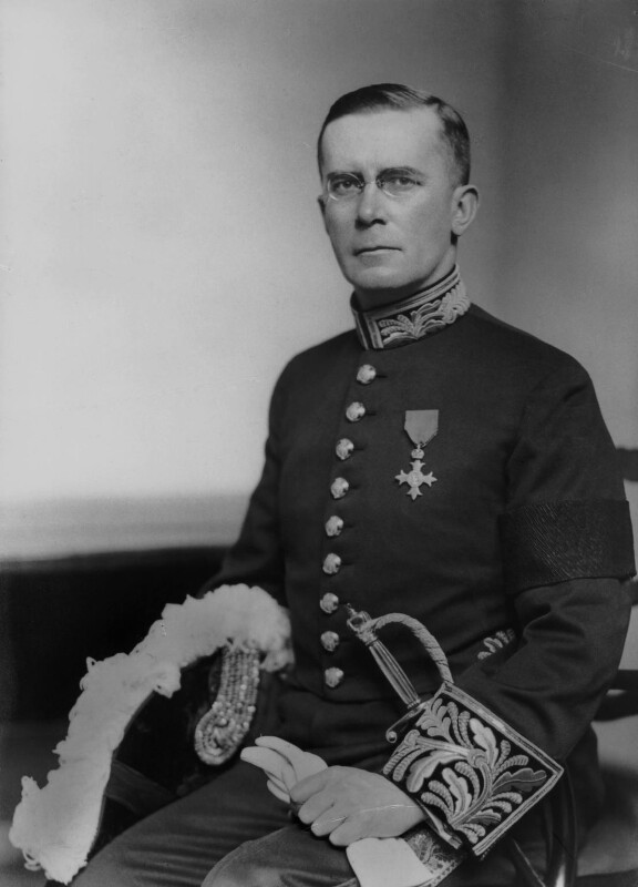 Lord Cooper